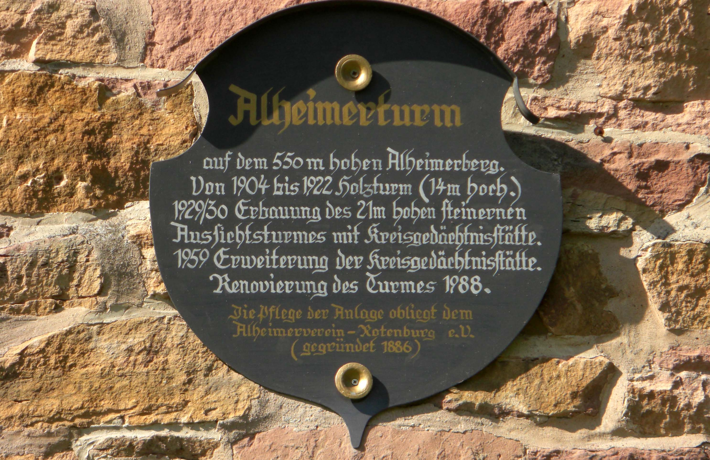 Hinweistafel am Ahlheimerturm in Hessen